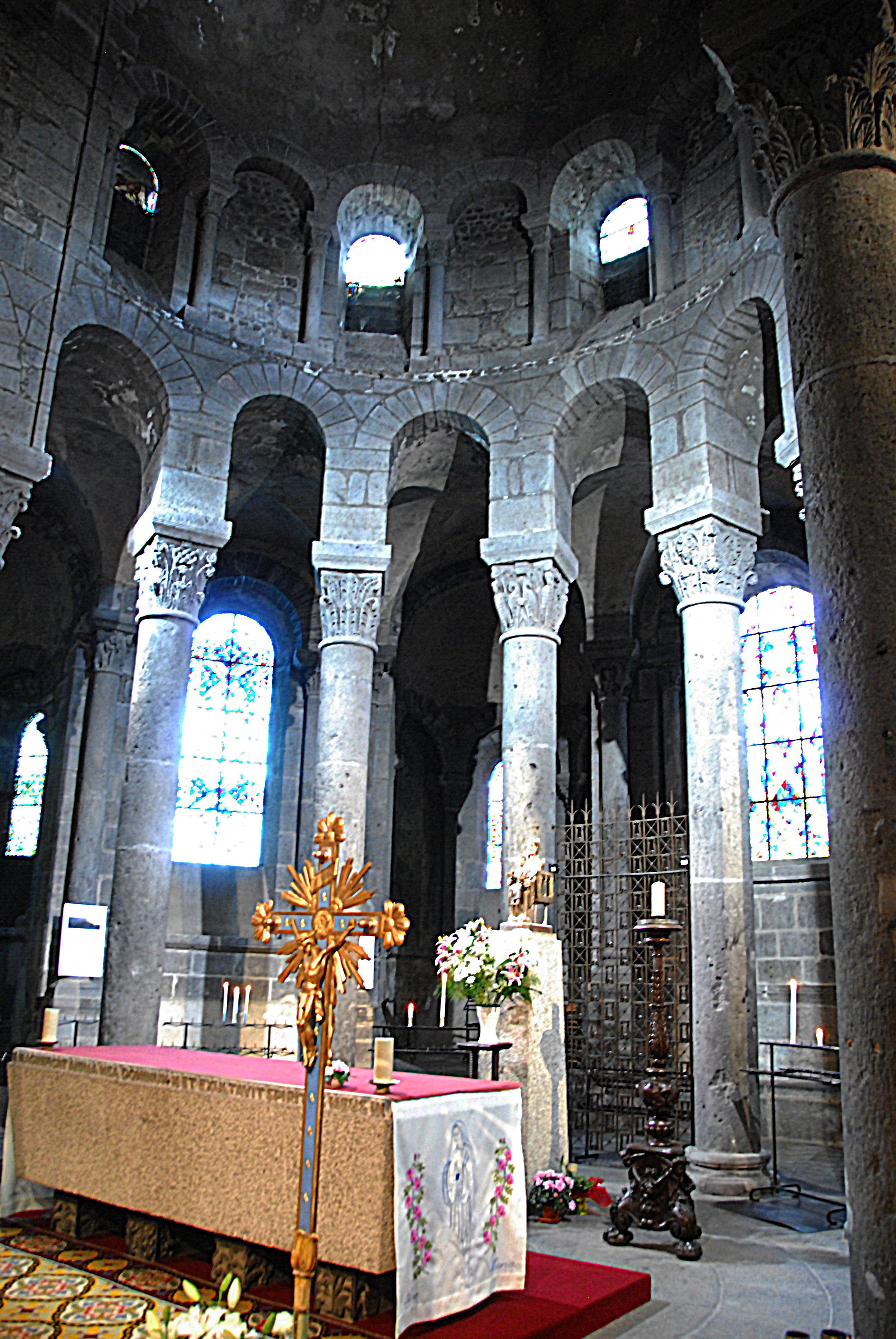 N.-D. d'Orcival, Chorapsis